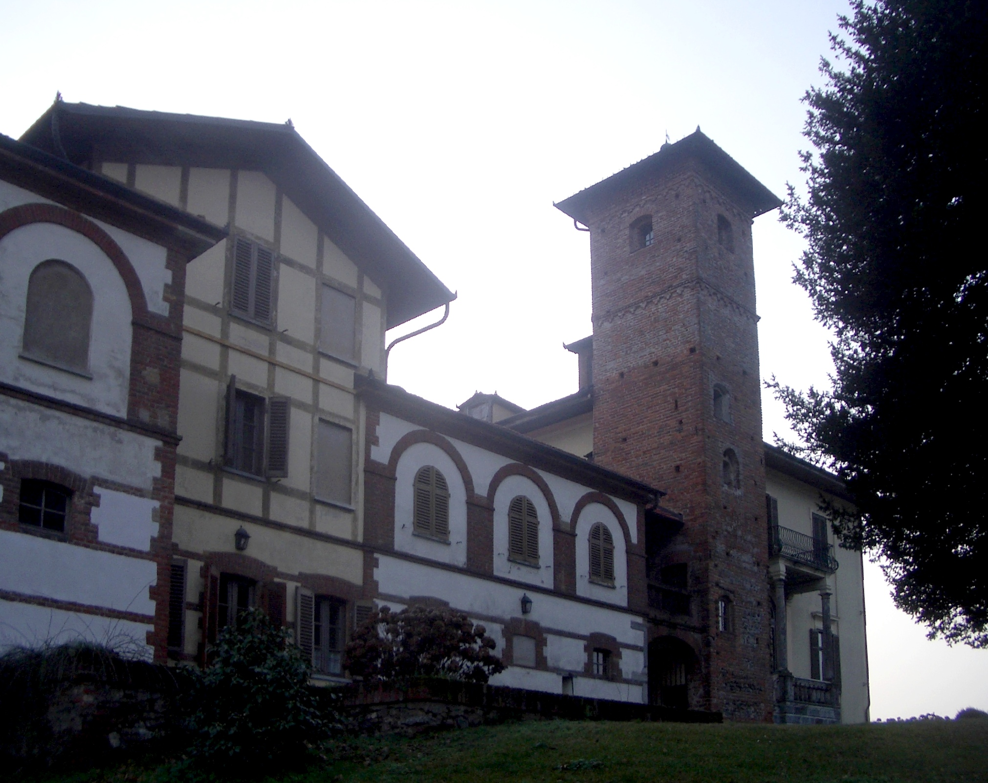 Castle, Borgomasino, Torino, Italy